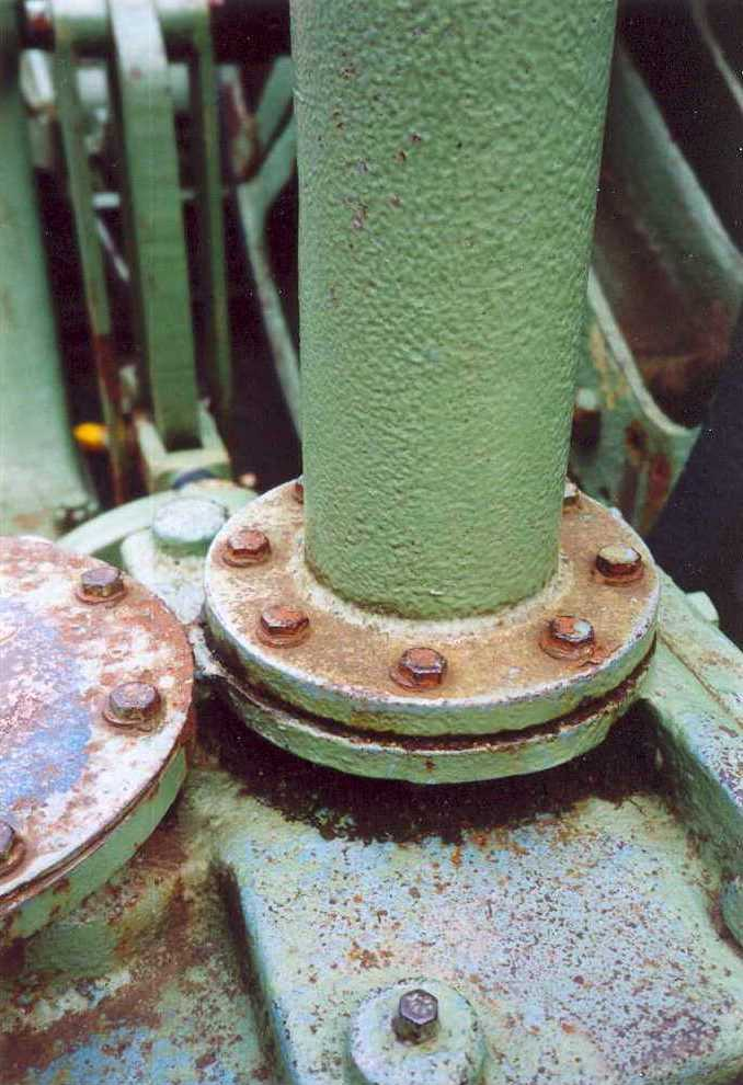 Flanschverbindung an einer Dampfmaschine